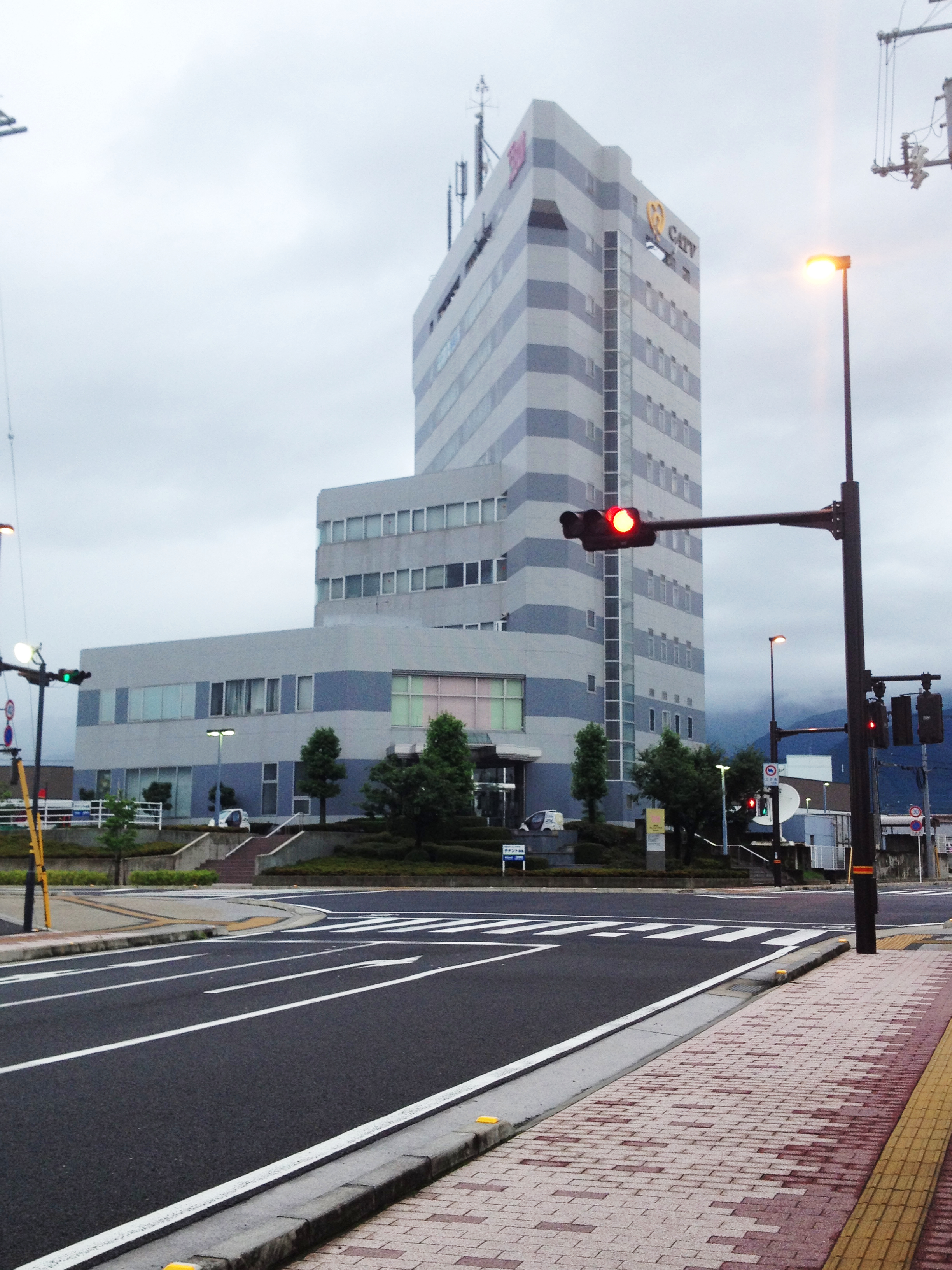 愛媛県新居浜市坂井町二丁目3-17、新居浜テレコムプラザビル。